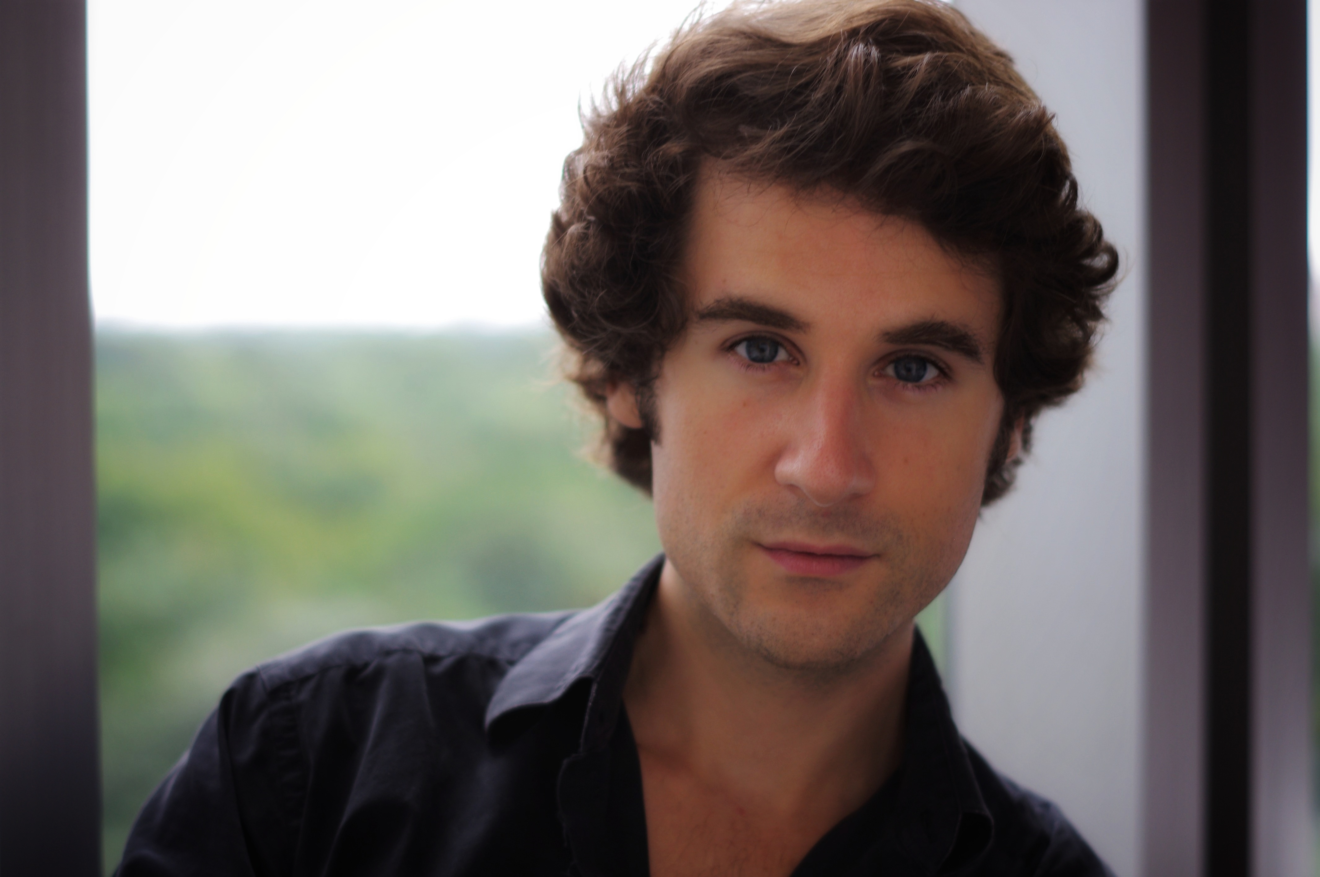 Virgil Boutellis-Taft à New York en 2019.